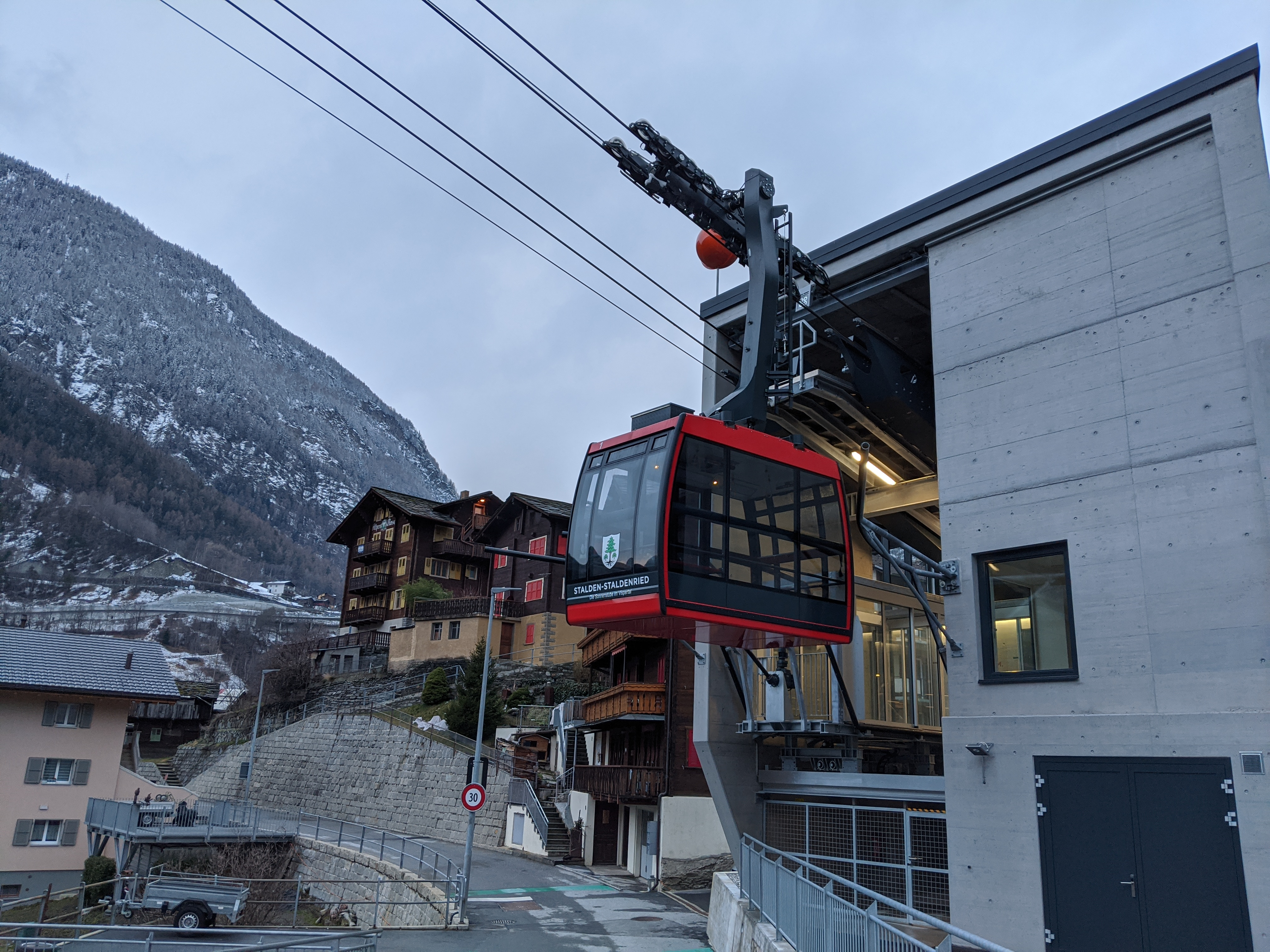 Luftseilbahn Stalden - Staldenried: Talstation in Stalden